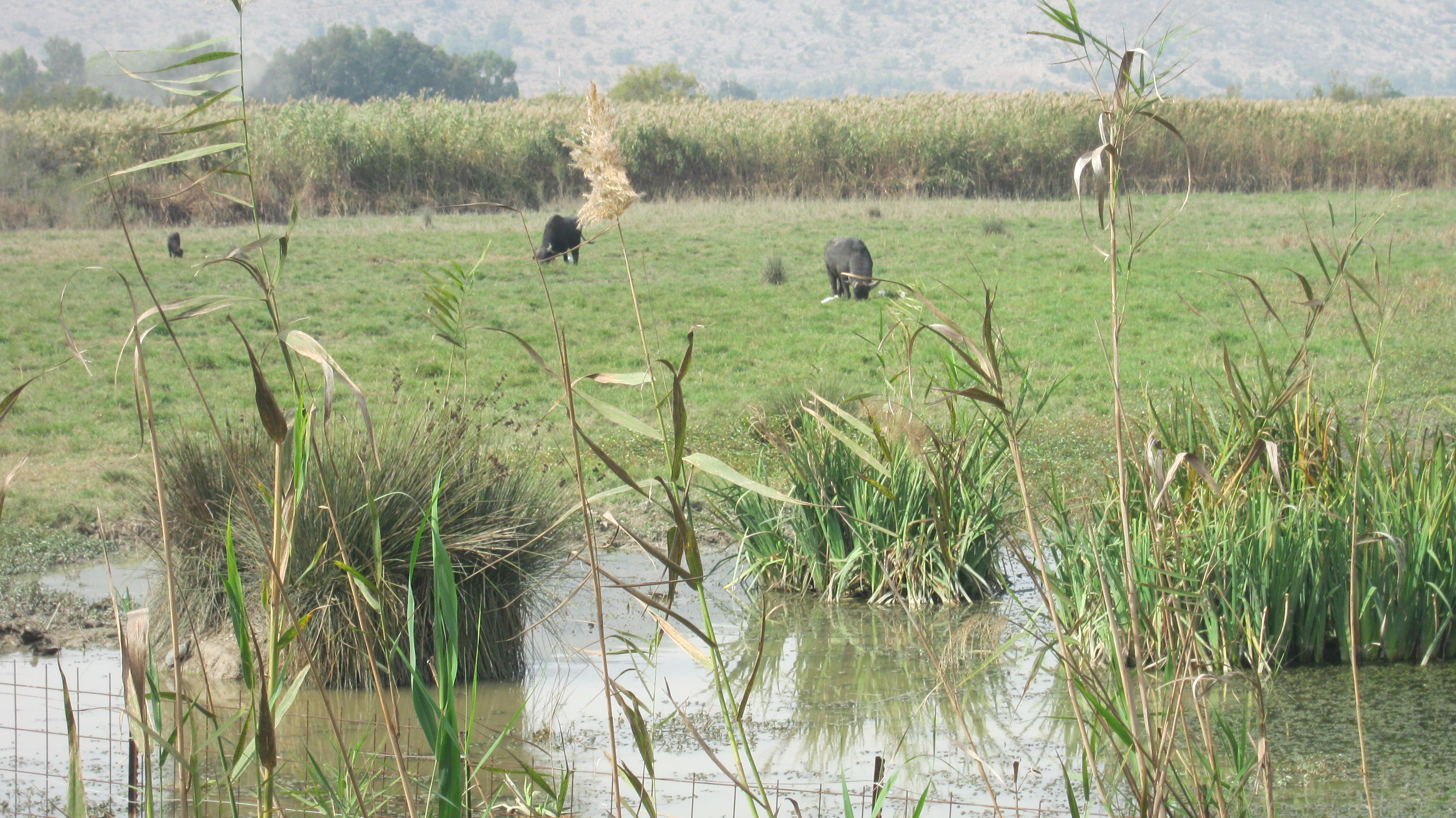 Hula lake animals